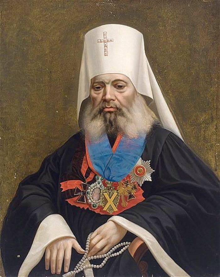 Іосіф (Сямашка)